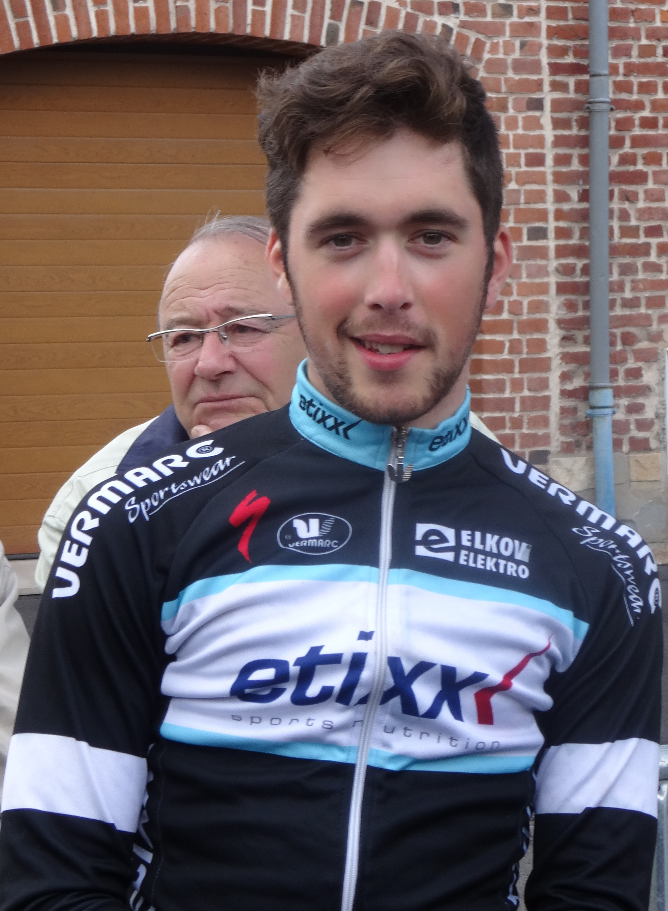 Reportage photographique réalisé le vendredi 23 mai 2014 à l'occasion du départ de la première étape du Paris-Arras Tour 2014 à Lens, Pas-de-Calais, Nord-Pas-de-Calais, France. Depicted person: Alexis Guérin